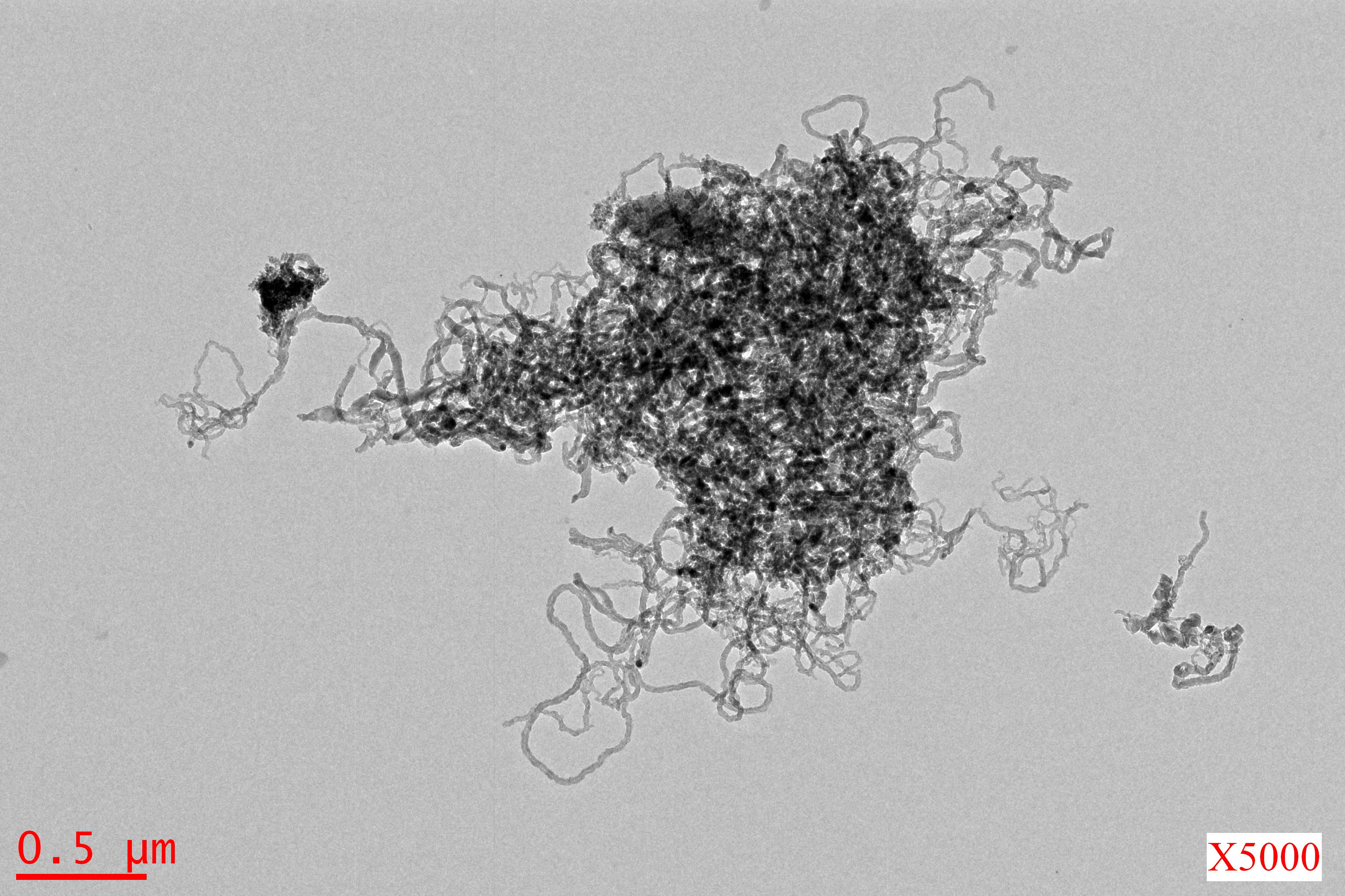 Pelote de nanofibres de carbone (plateforme de microscopie électronique de l'Institut de Science des Matériaux de Mulhouse - CNRS UMR 7361